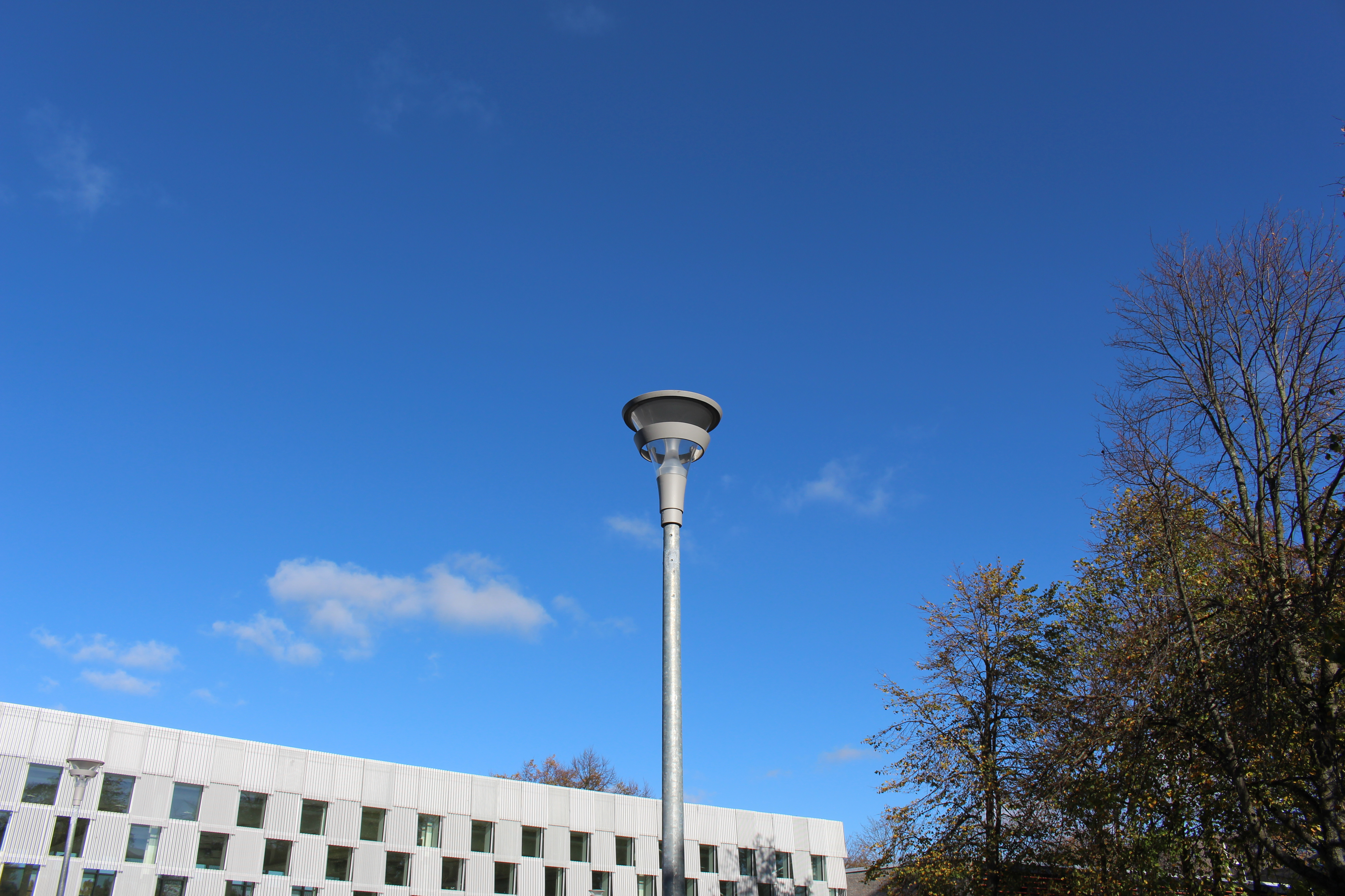 A-lygten